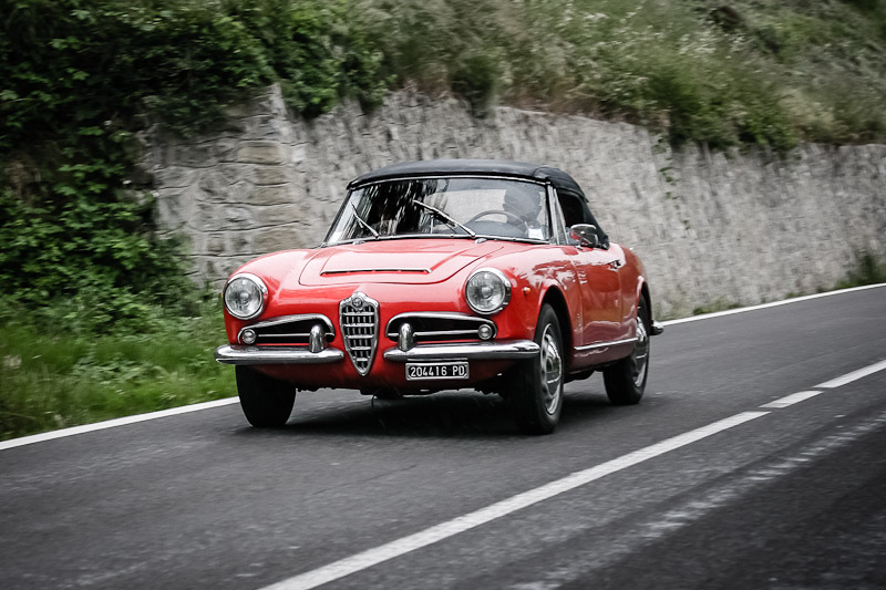 1000 miglia 2012 - SS della Futa . Pianoro (BO)